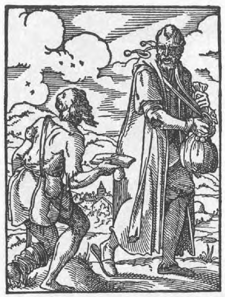 "Der Geltnarr" aus Eigentliche Beschreibung aller Stände auf Erden (1568)